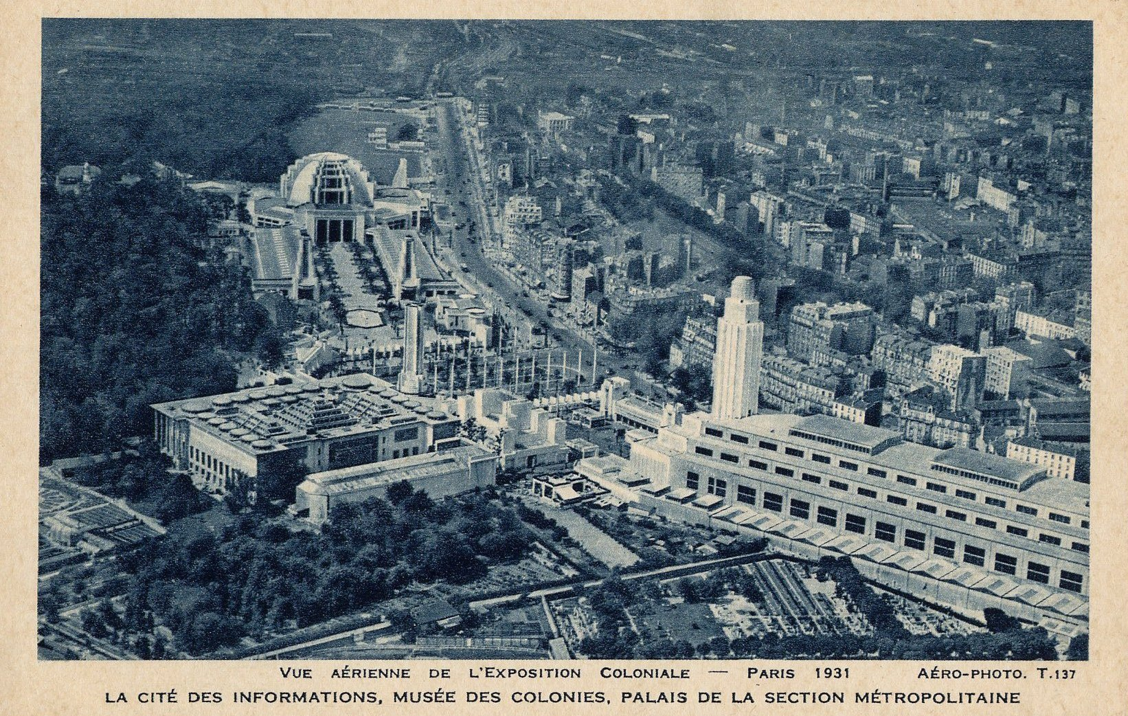 Vue aérienne des bâtiments de la section métropolitaine de l'Exposition Coloniale de Paris en 1931. Sur la gauche se trouve le Palais de la Porte Dorée et au centre le boulevard Poniatowski